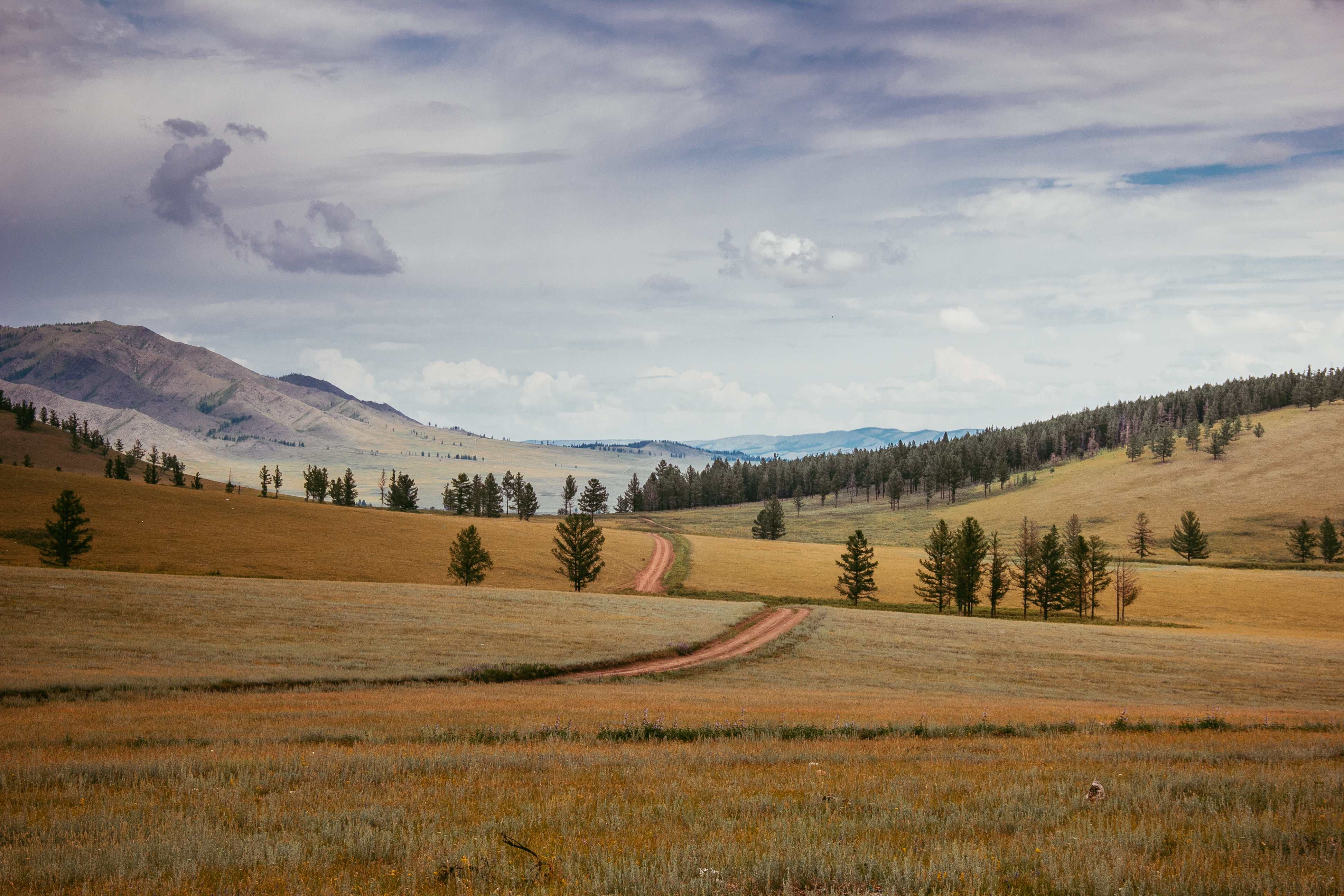 село Холчук, Республики Тыва, РФ